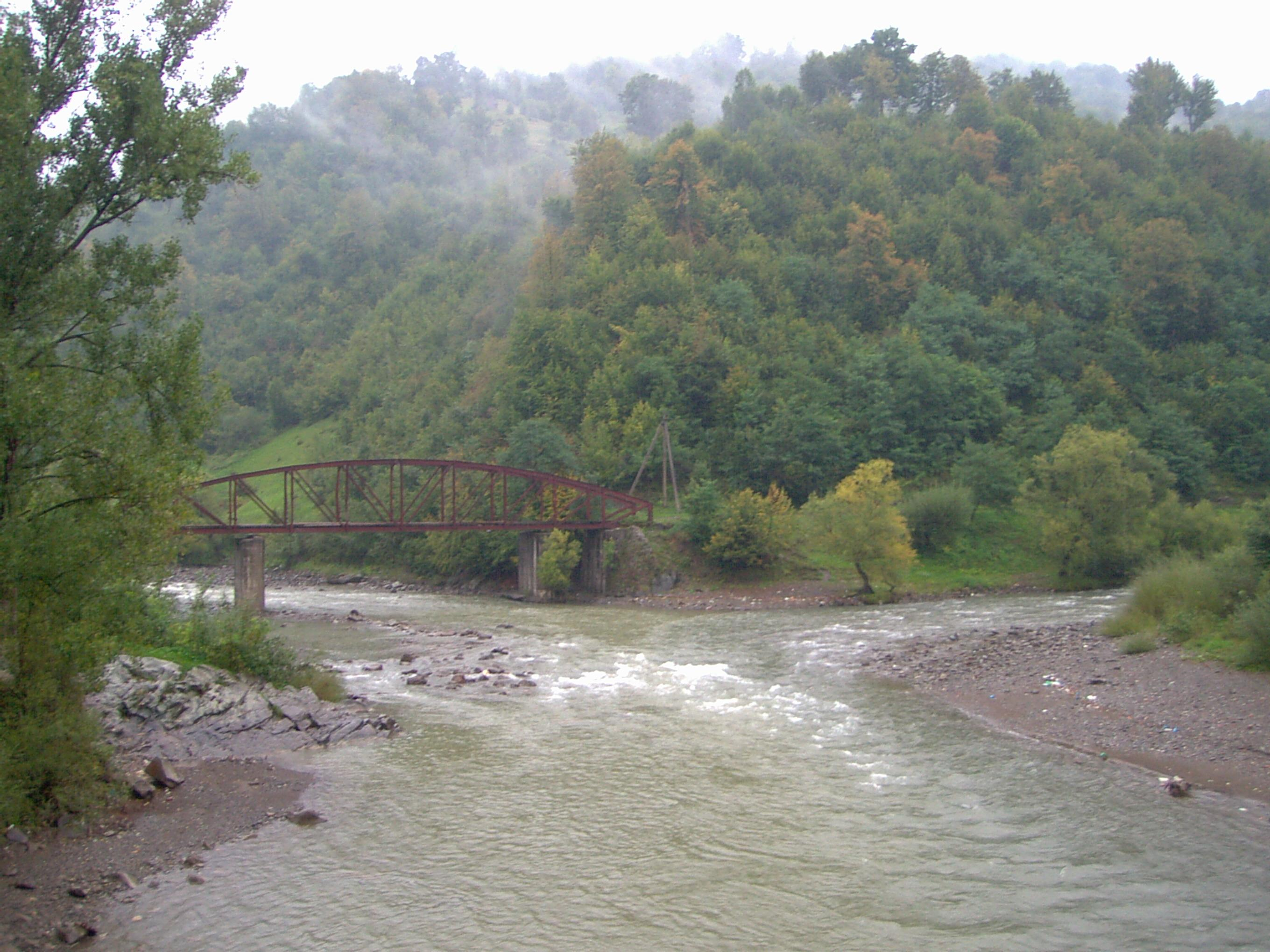 Zusammenfluss von Schwarzer (links) und Weißer Theiß (rechts) bei Rakhiv.